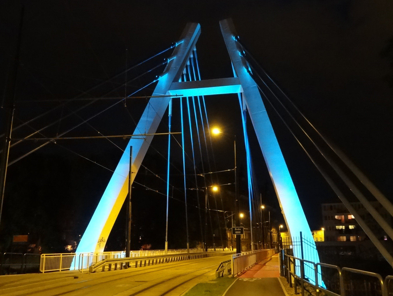 Most tramwajowy im. Władysława Jagiełły nad Brdą w Bydgoszczy